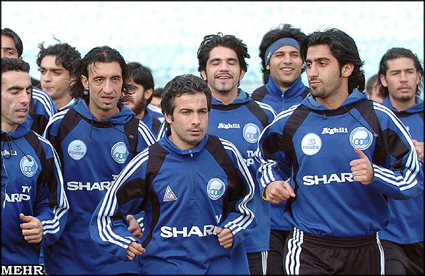 تيم فوتبال استقلال تهران پس از كسب نتيجه مساوي 2 بر2 مقابل سپاهان اصفهان عصر امروز تمريناتش را براي ديدار هفته شانزدهم مقابل استقلال اهوازآغاز كرد.